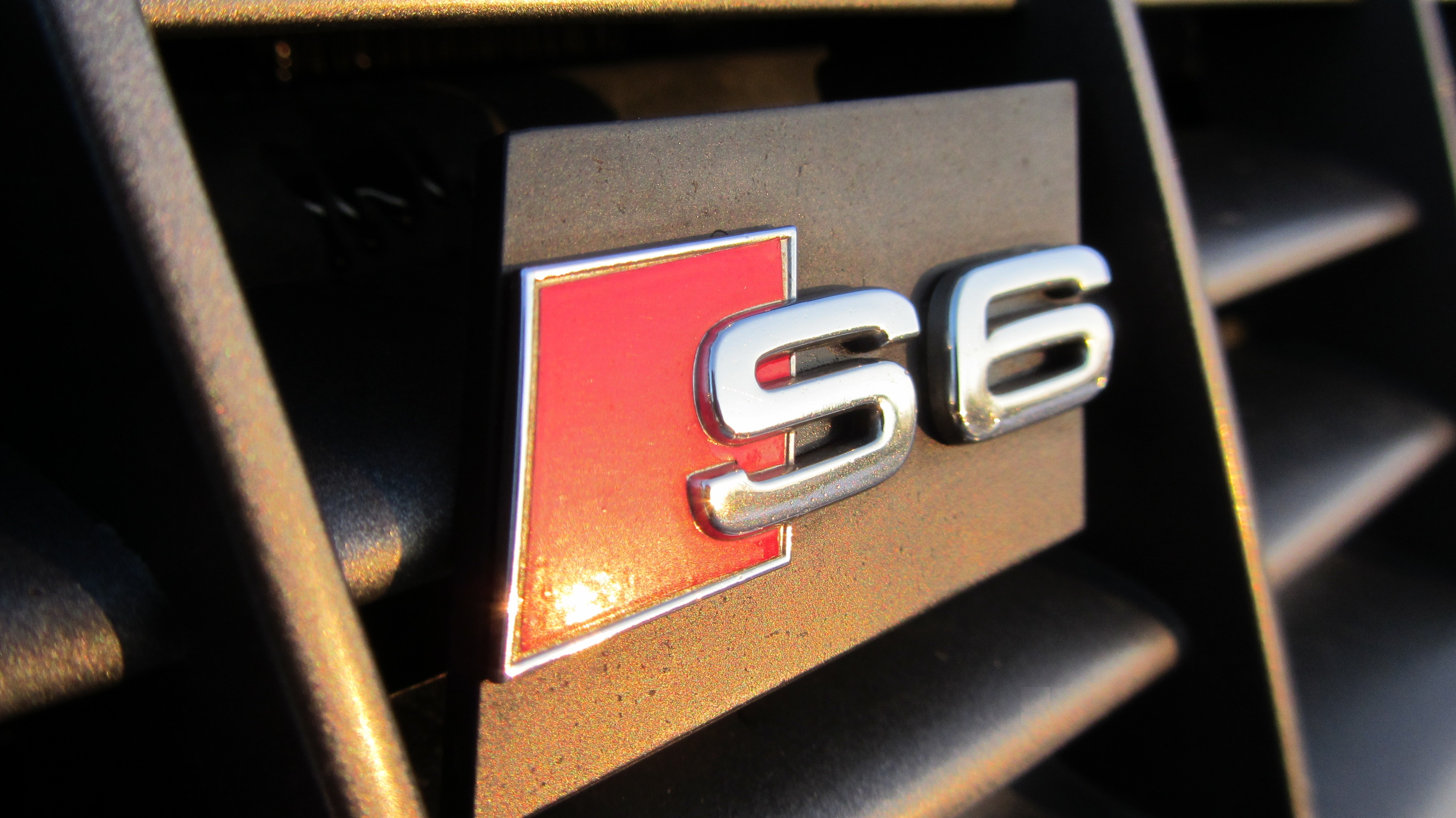 Audi S6 Emblem